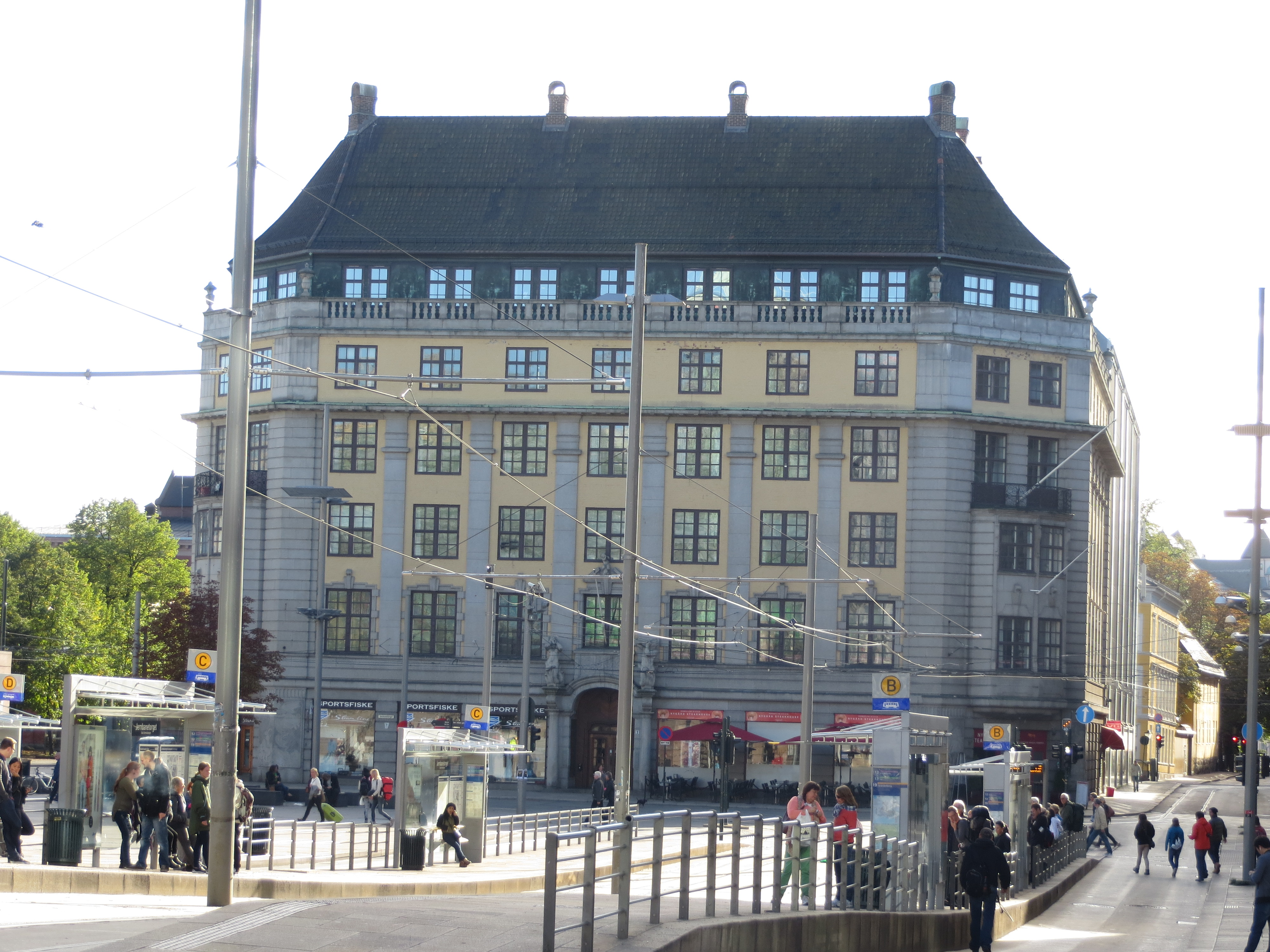 Den norske Amerikalinjes tidligere hovedkontor